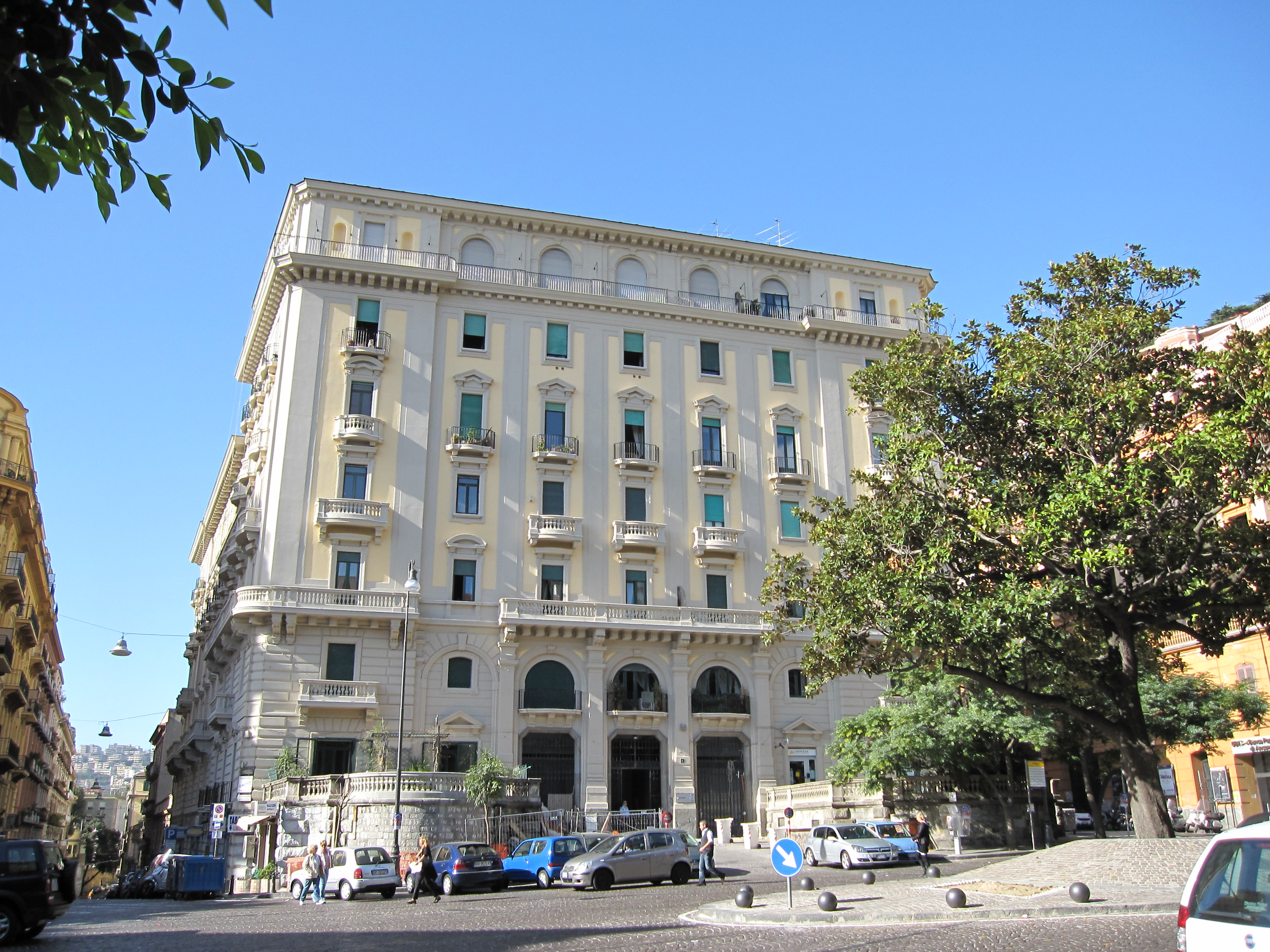 Giulio Ulisse Arata - Palazzo Cottrau-Ricciardi (Piazza Amedeo 8, Napoli) Realizzato tra il 1925 e il 1926.